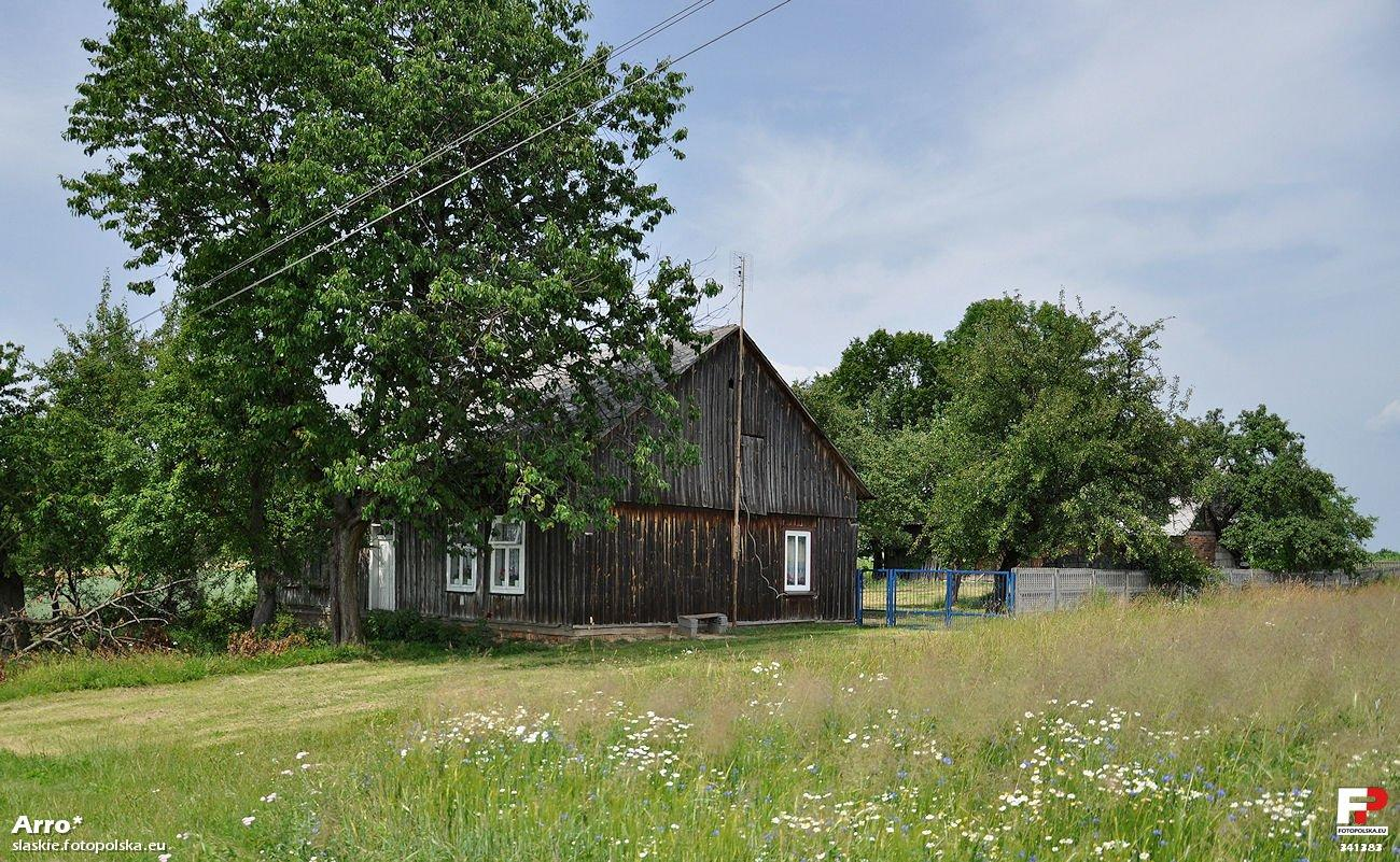 Wygiełzów 5 - dom mieszkalny ukryty wśród zieleni.